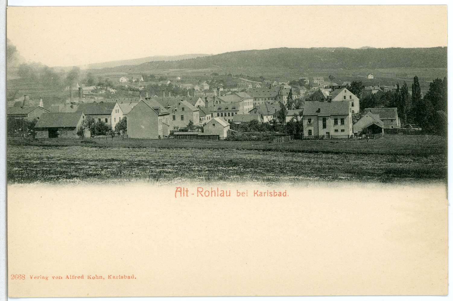 Altrohlau; Blick auf Altrohlau bei Karlsbad Diese Ansichtskarte stammt vom Kunstverlag Brück & Sohn aus Meißen ( Die Karte hat die eindeutige Nummer 02668 und ist in höherer Auflösung beim Verlag erhältlich. Sie wurde im Rahmen einer Kooperation zwischen Wikipedianern und dem Kunstverlag für Wikimedia Commons zur Verfügung gestellt.